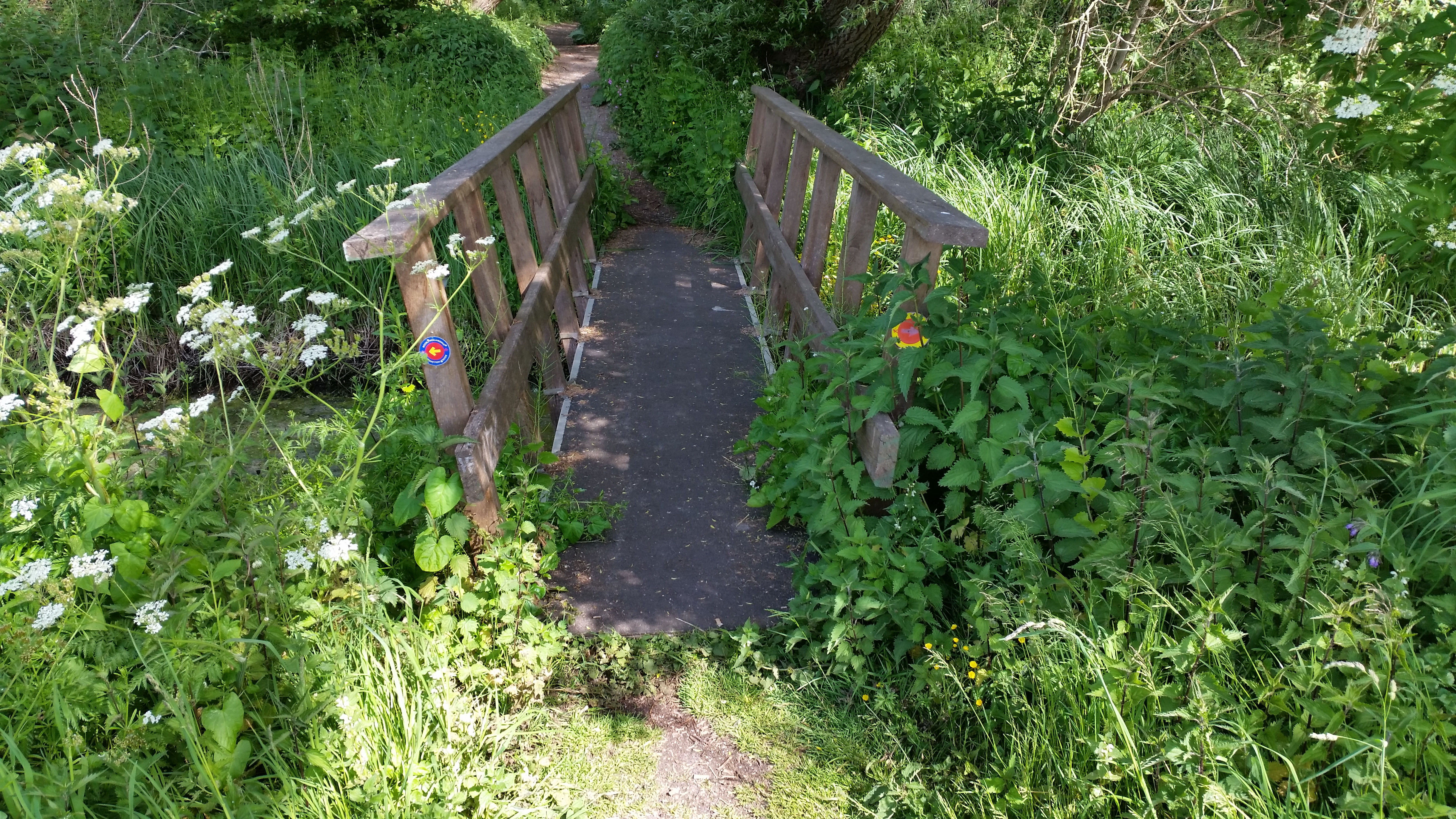 Impressie van voetbrug 1859 aan het Jaagpad bij de Nieuwe Meer, Amsterdam Nieuw-West